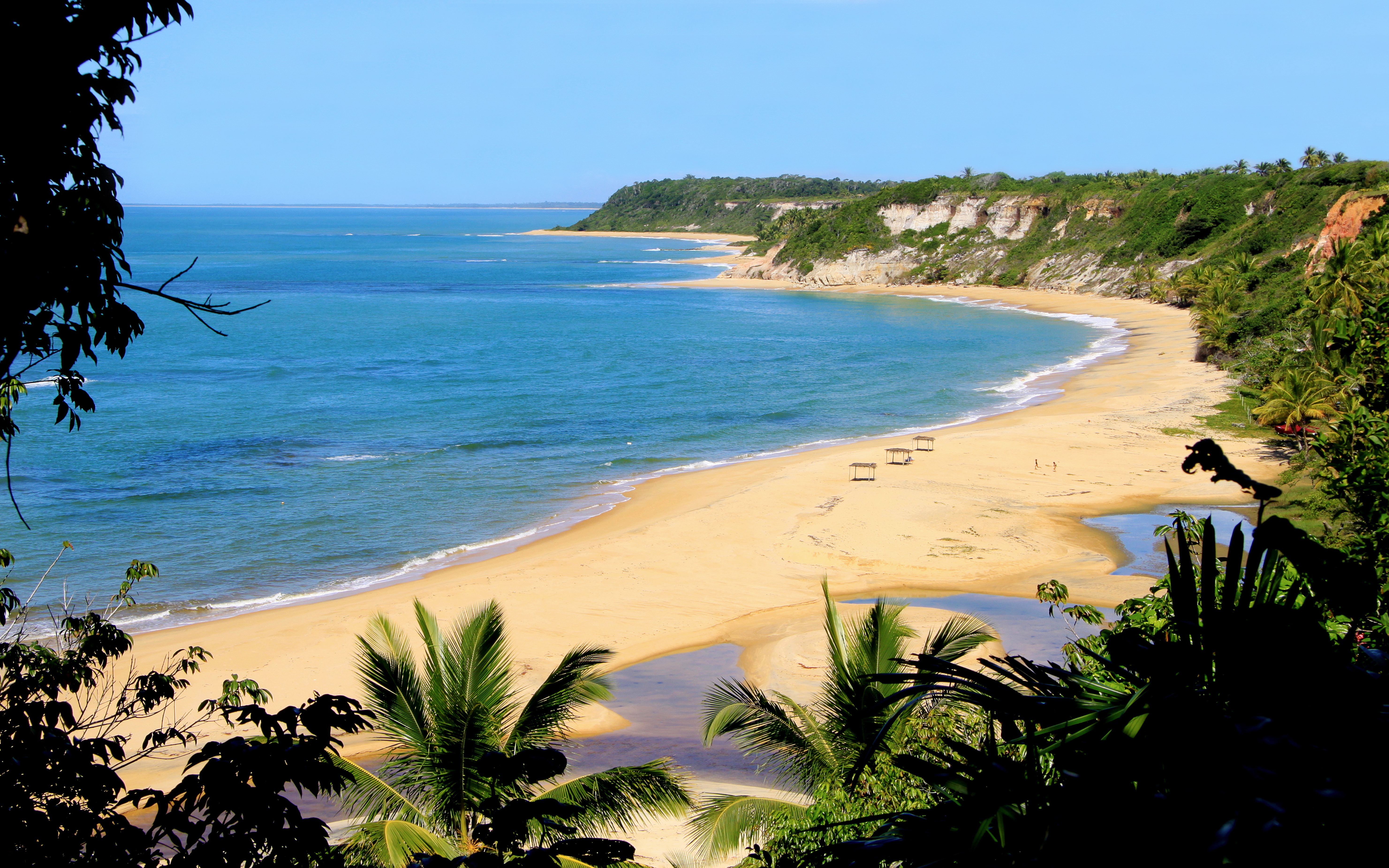 Praia do Espelho, próximo a Trancoso, Bahia.